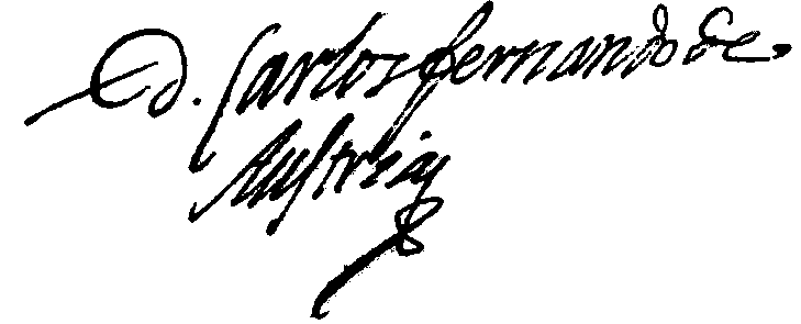 Firma del testamento de Carlos Fernando de Austria